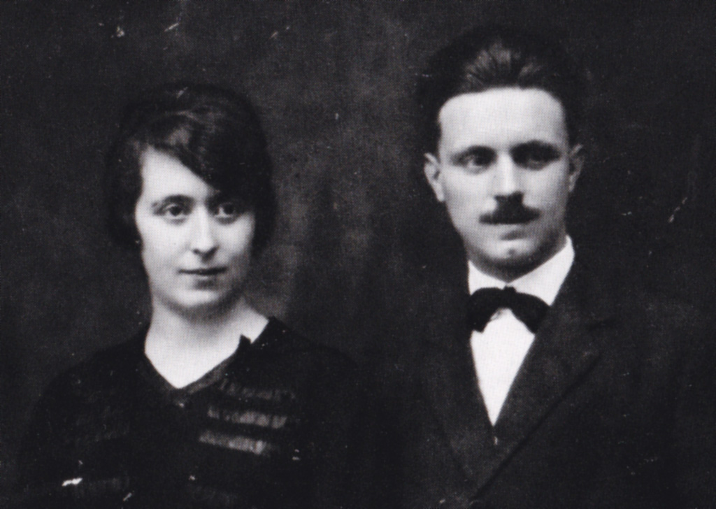 Voda de Teresa Chao Maciñeira e Ramón Villar Ponte